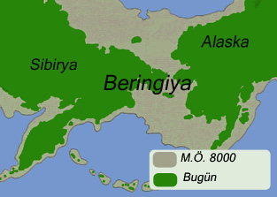 kendim çizdim